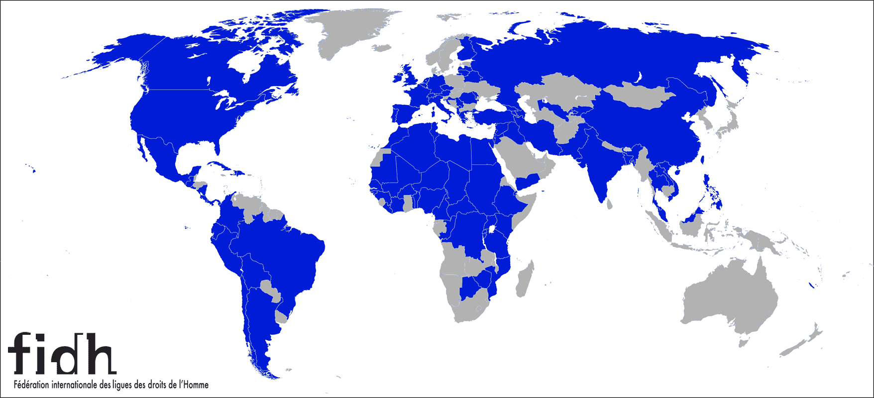 La FIDH représente 155 organisations de défense des Droits de l'Homme réparties sur les 5 continents. Sur cette carte sont représentés en bleu les pays où la FIDH compte au moins une ligue membre.